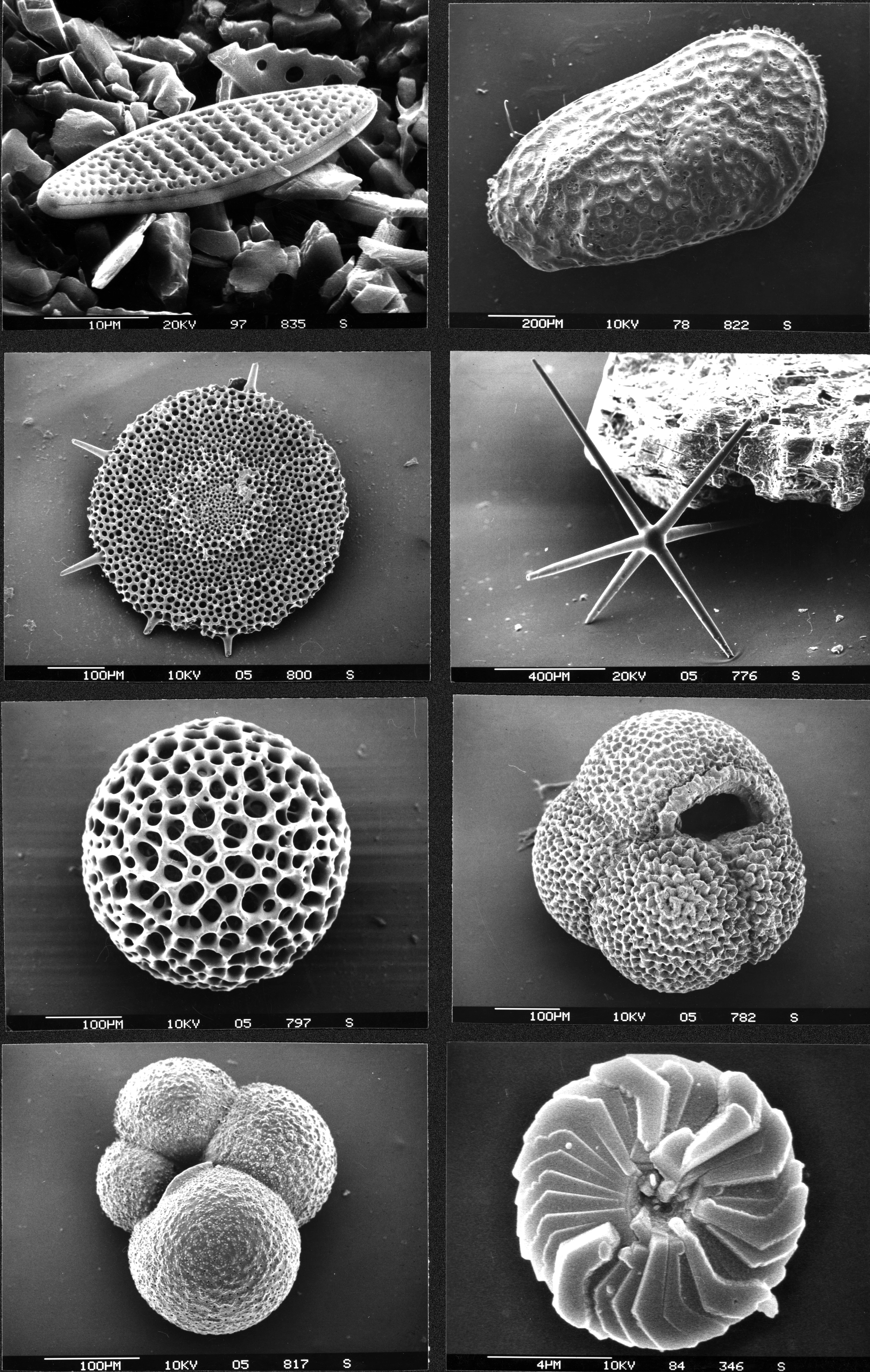 Marine microfossils (diatom, ostracod, radiolaria, sponge spicule, radiolaria, planktonic foraminifera, planktonic foraminifera, coccolith